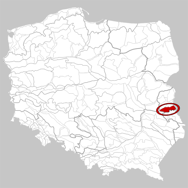 Physico-geographical regionalization of Poland Mezoregion 845.16 Łęczna-Włodawa Plain Regionalizacja fizycznogeograficzna Polski Mezoregion 845.16 Równina Łęczyńsko-Włodawska